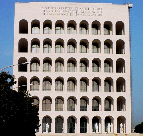 Facciata del Palazzo delle Esposizioni